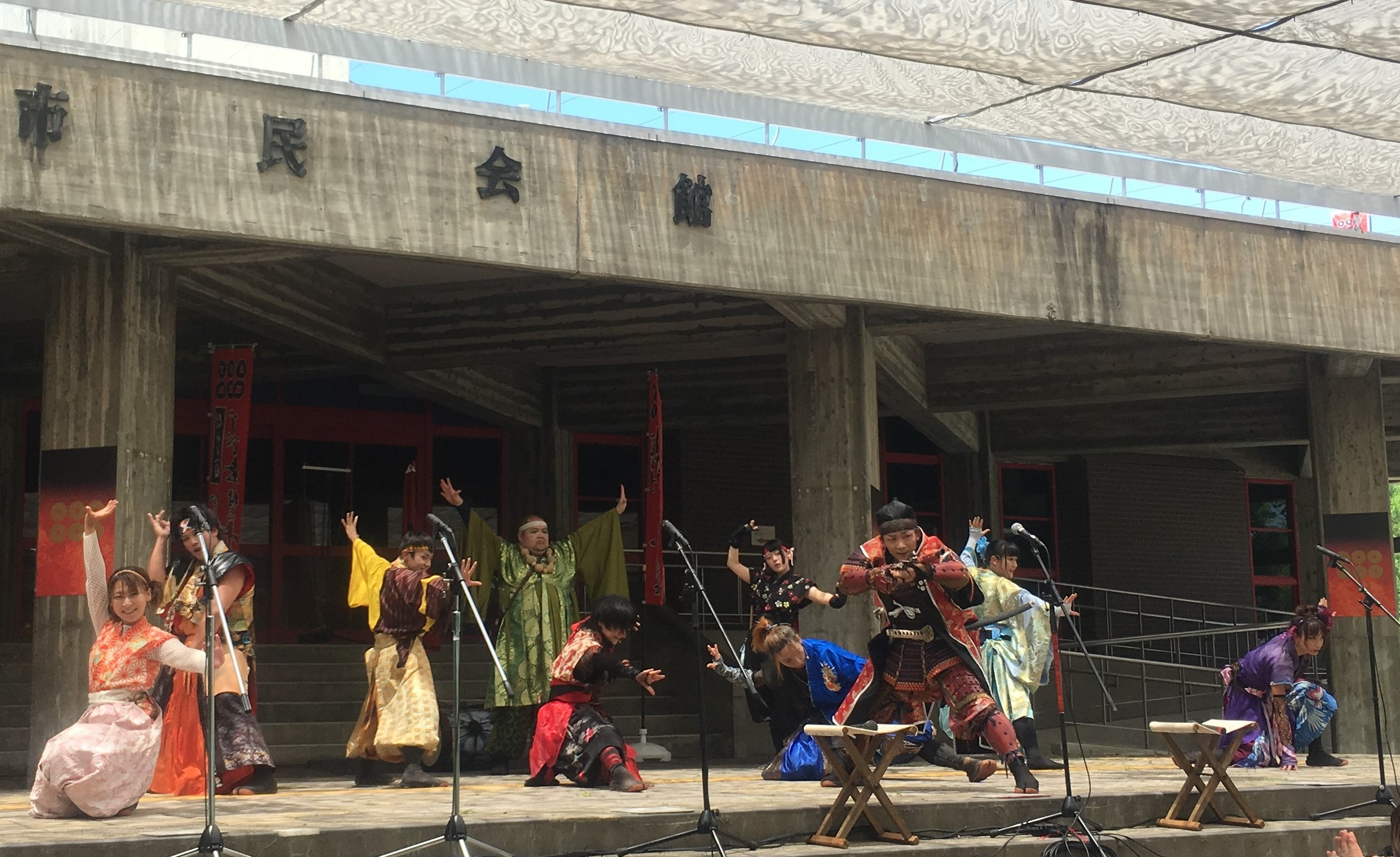 ２０１８年７月１５日 信州上田城熱演舞